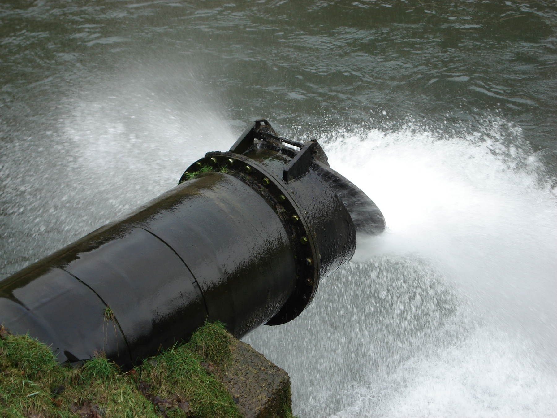 Dëst Bild weist d'Réckschlagklapp vum Ausschosswaaser bei der Staumauer um Barrage Esch-Sauer.